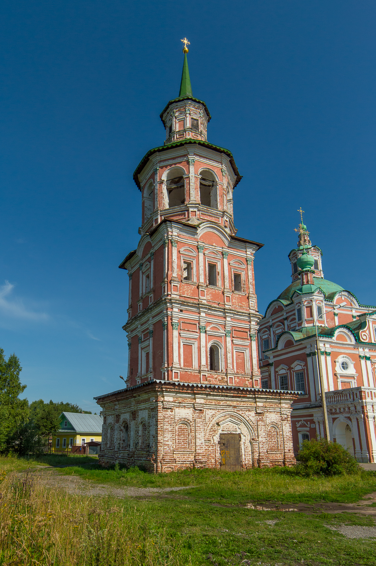 Колокольня: улица Энгельса, 2 (Набережная улица), Великий Устюг, Вологодская область